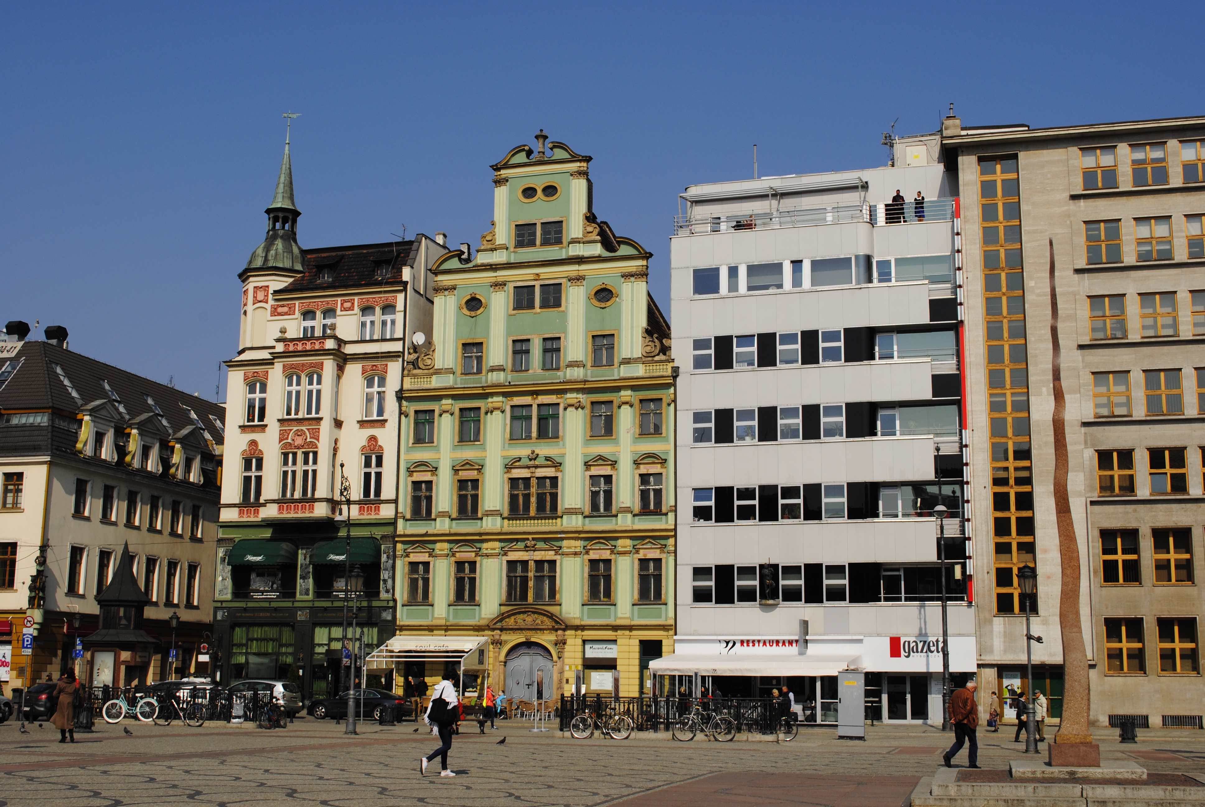 Die Nordseite des Breslauer Salzmarktes